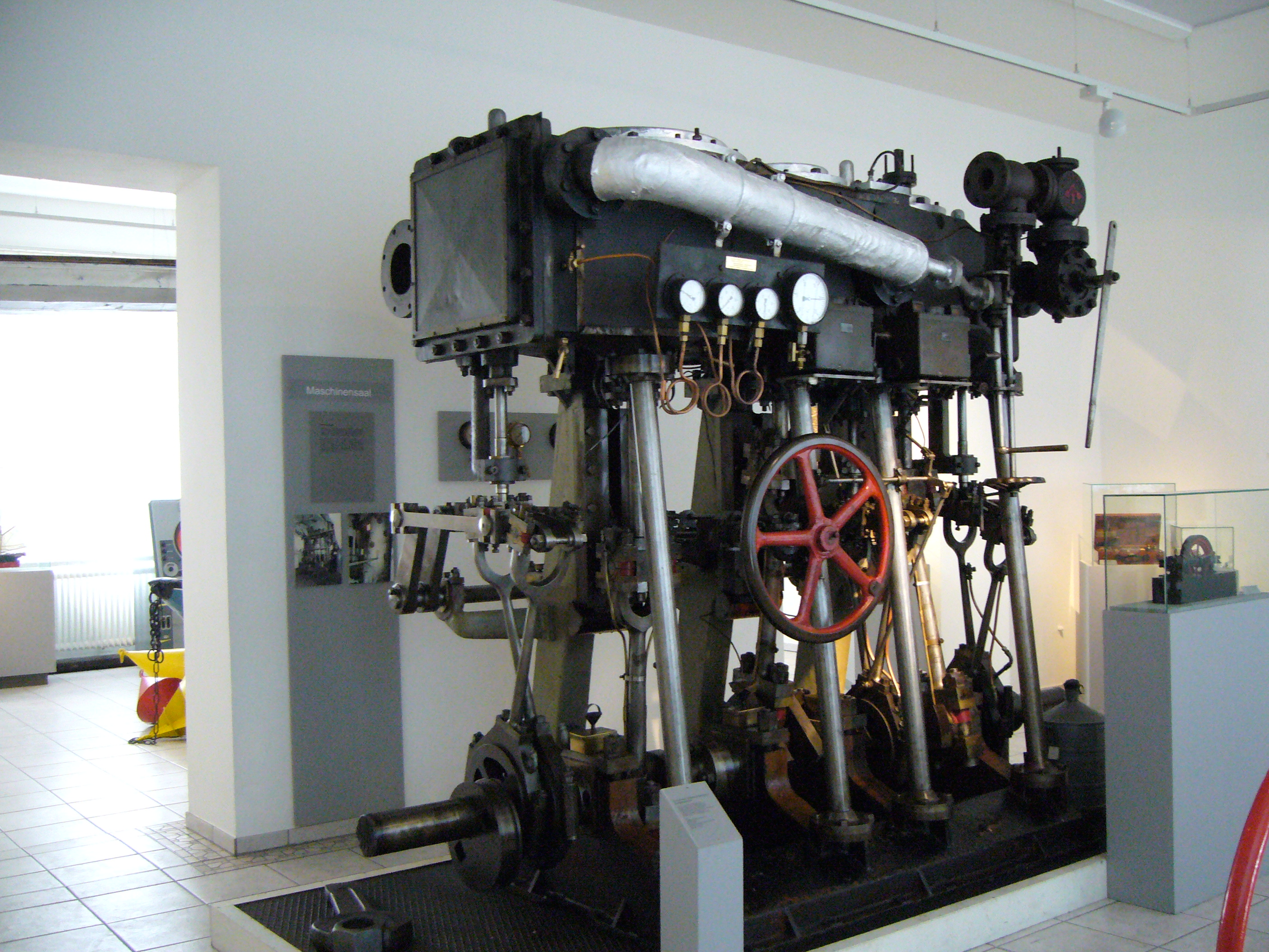 3-Zyl-Dampfmaschine